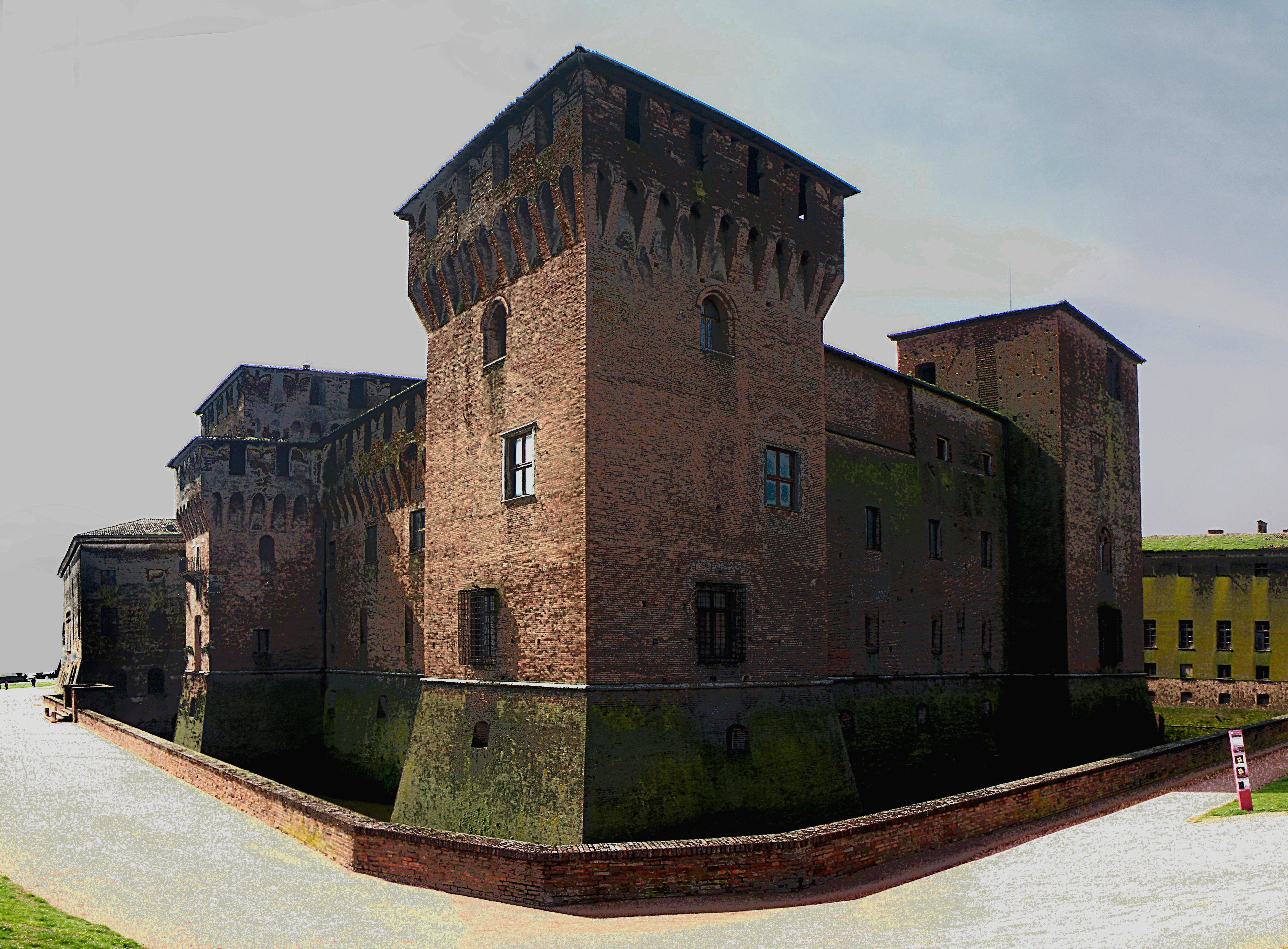 Замок св.Георгия (вассершлосс)